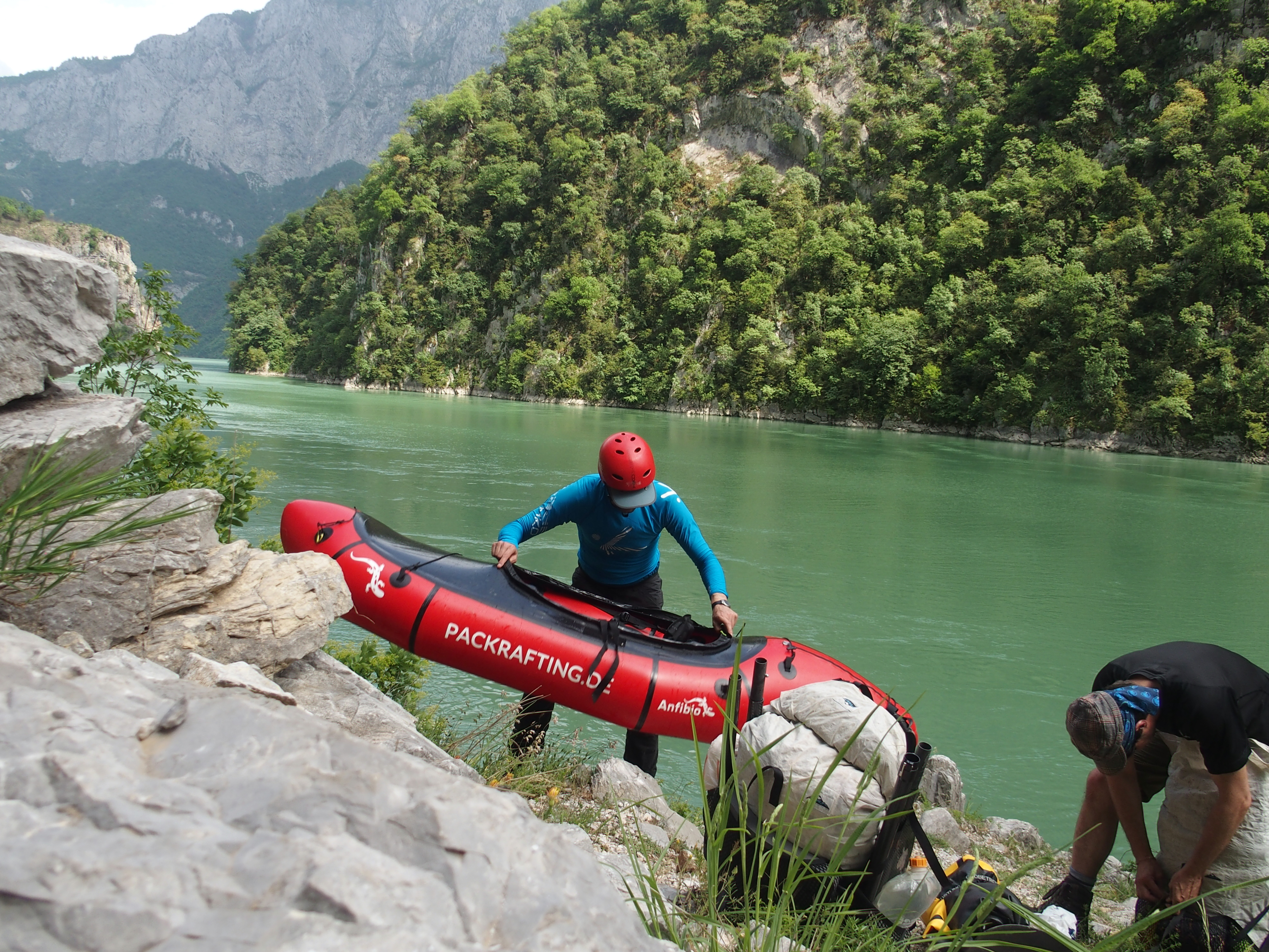 Flexibler Einstieg